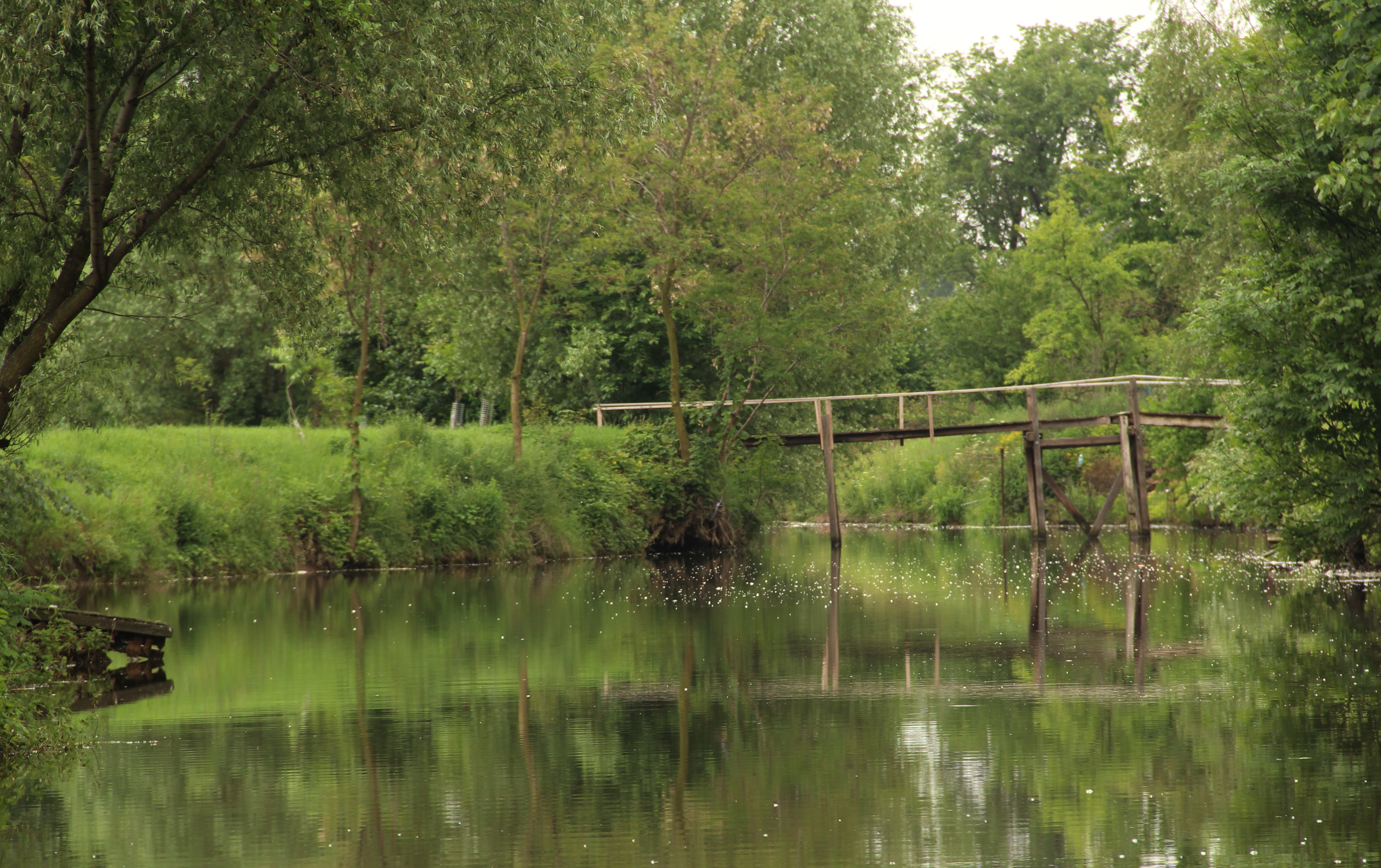 PŘP Niva Jihlavy